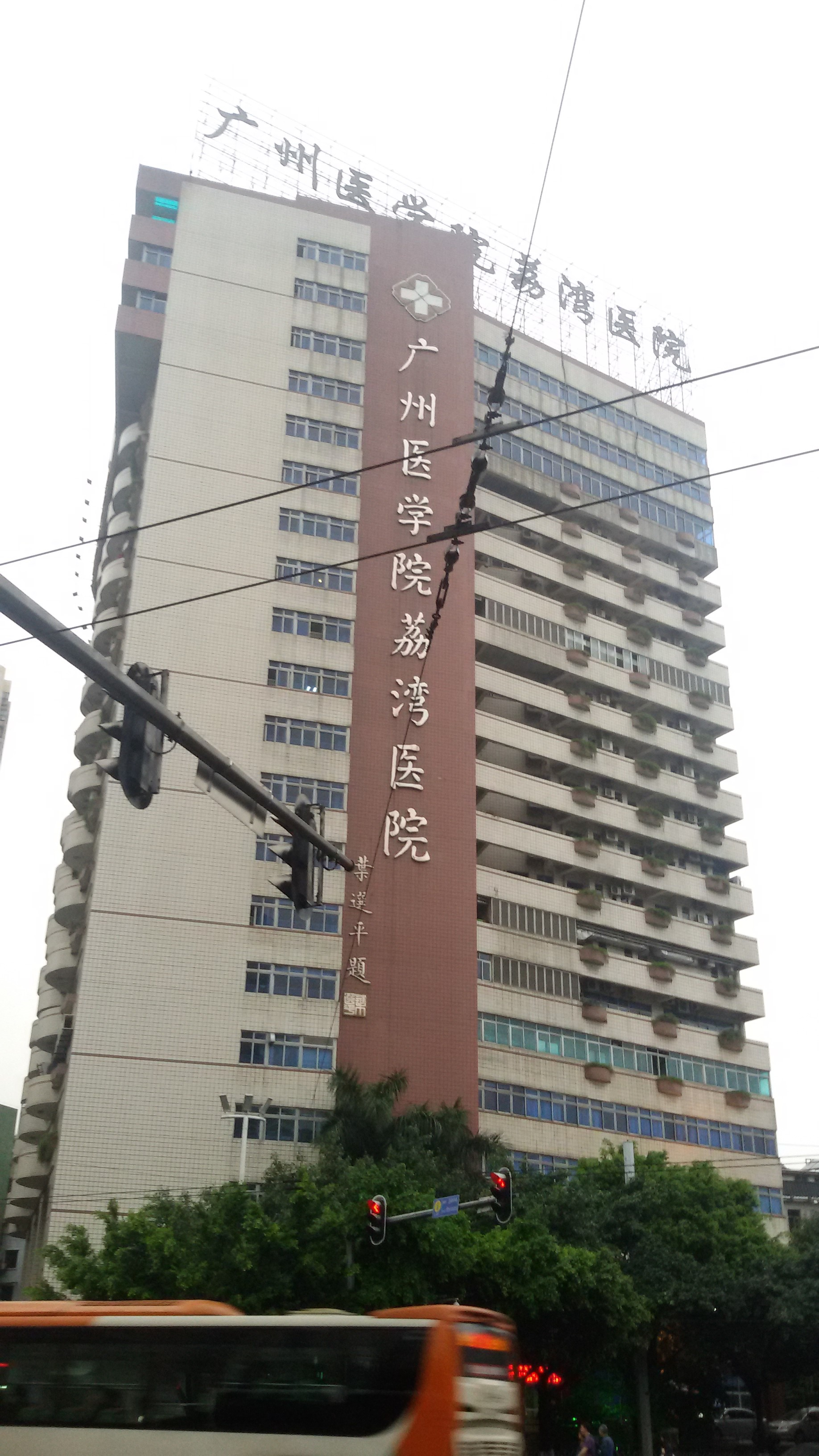 粵語: 廣州醫學院荔灣醫院